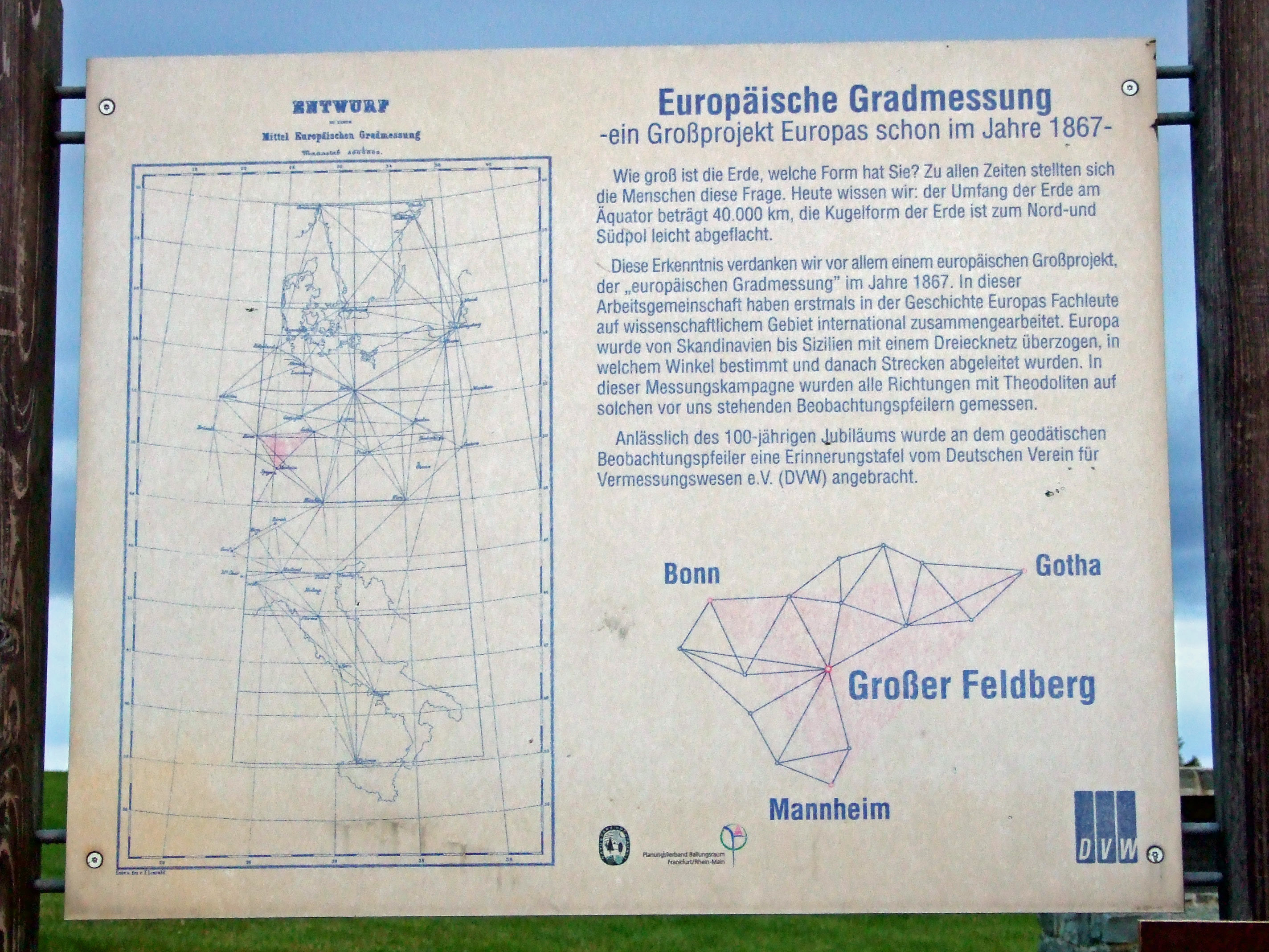 Gedenktafel zur Europaeischen Gradmessung auf dem Grossen Feldberg im Taunus